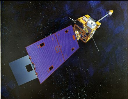 GOES 8 to 12 satellite images